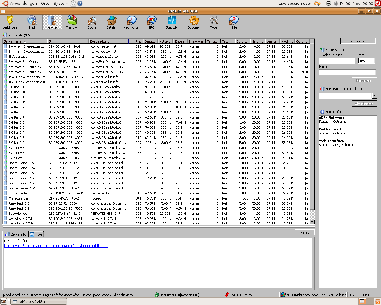 eMule v0.48a under Ubuntu 7.10 (de)